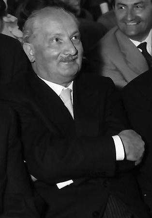 Photograph of Martin Heidegger. Detail of a phototograph entitled : "W 134 Nr. 060678c - Hausen: Festakt, in der Reihe, Kultusminister Storz, Prof. Heidegger, Dichtel". Additional reference : Teilbestand W 134 (Neg. BaWü), Teil 1 - Fotosammlung Willy Pragher: Filmnegative Baden-Württemberg, Teil 1.